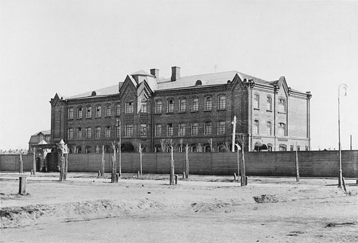 189. Городской арестный домъ на Хавской ул. (Москва - ныне институт ФСБ)